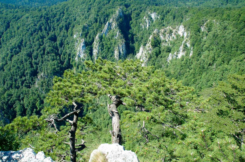 Српски (ћирилица): Видиковац на Тари